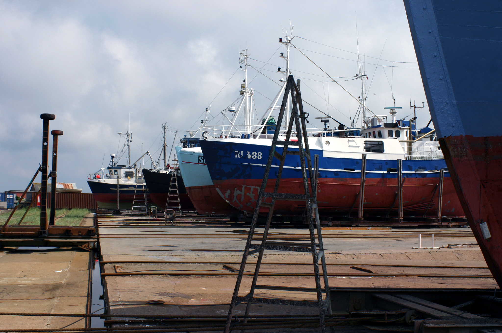 Hvide Sande, Danmark, Dockyard